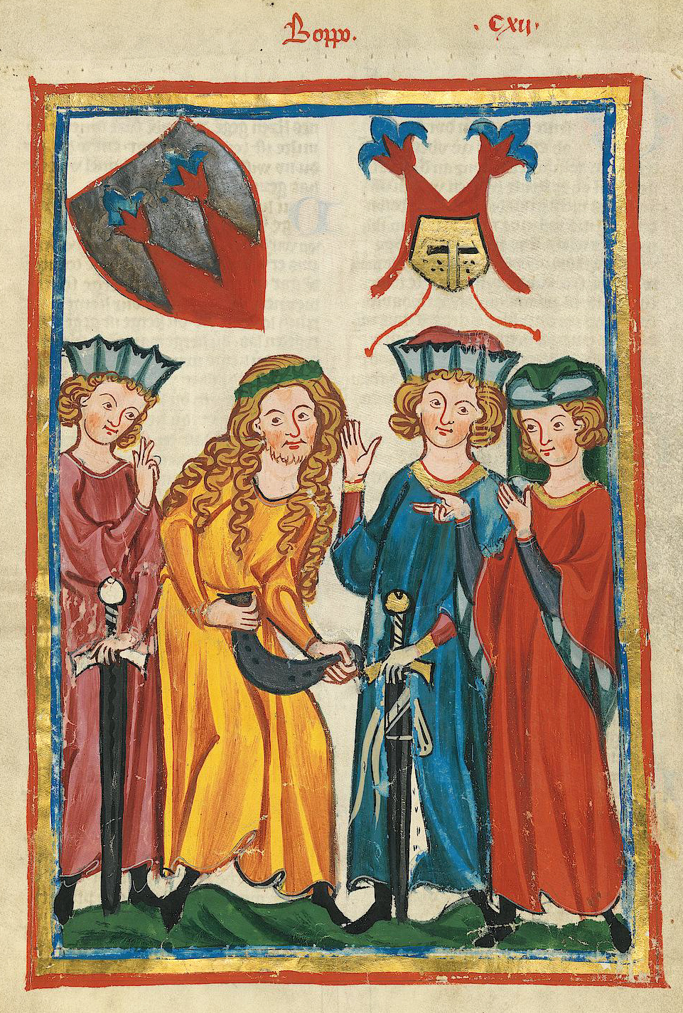 Codex Manesse, UB Heidelberg, Cod. Pal. germ. 848, fol. 418r: Boppe (der „starke Boppe“ verbiegt ein Hufeisen)